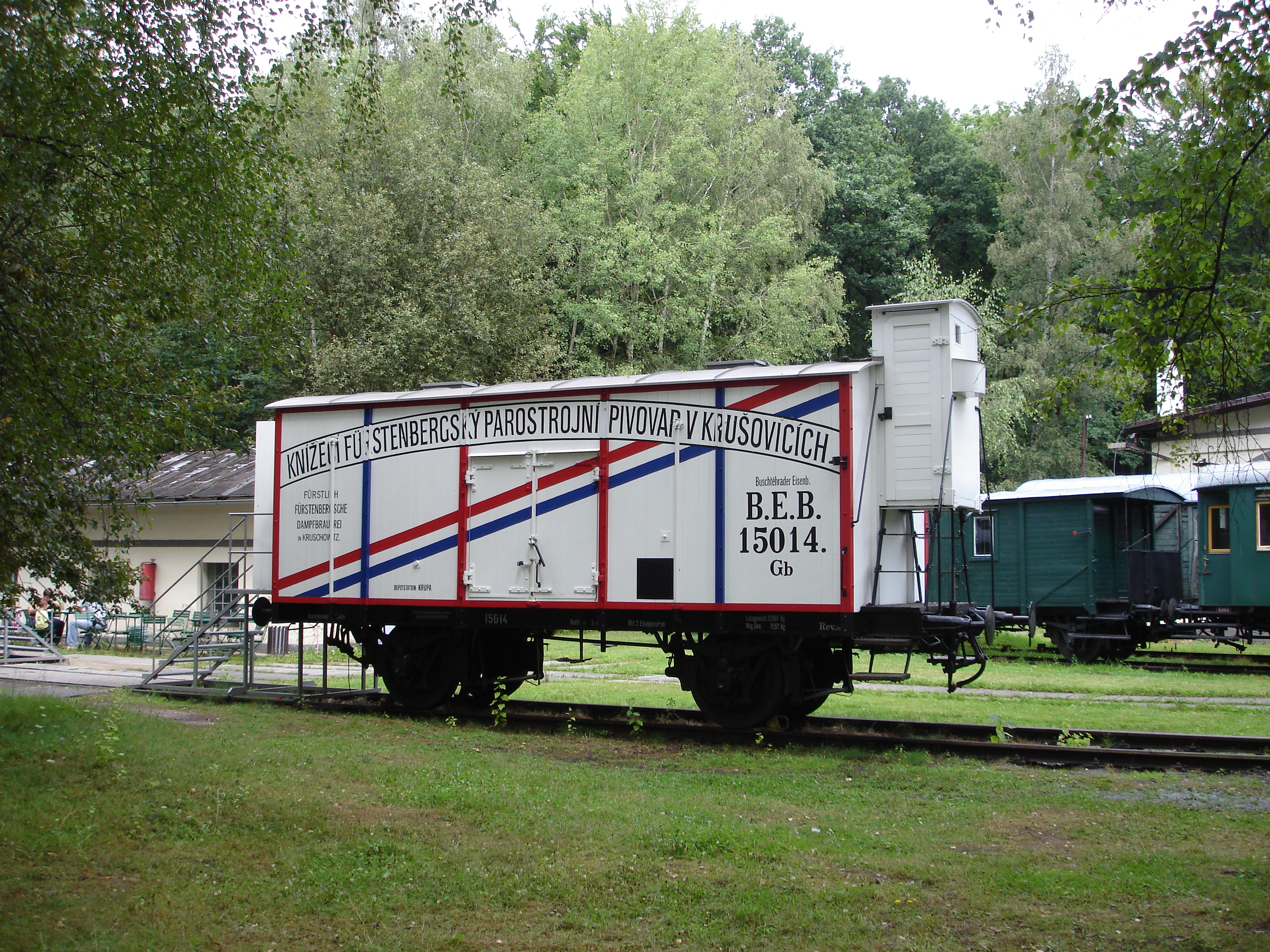 Bierwagen der „Fürstlich Fürstenbergschen Dampfbrauerei in Kruschowitz“ bei der Buschtěhrader Eisenbahn im Eisenbahnmuseum Lužná u Rakovníka